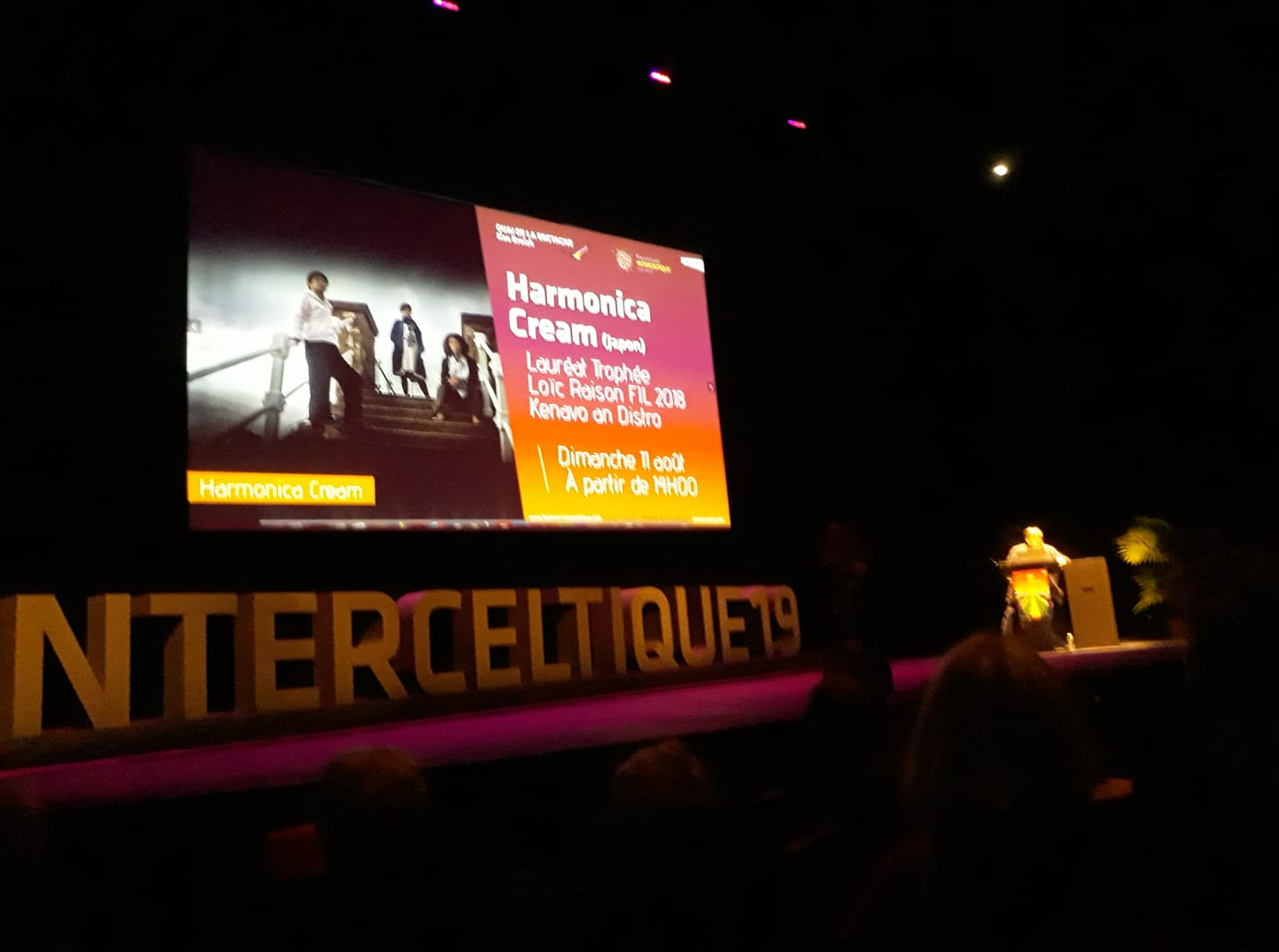 Annonce de la programmation de l'édition 2019 du festival interceltique de Lorient